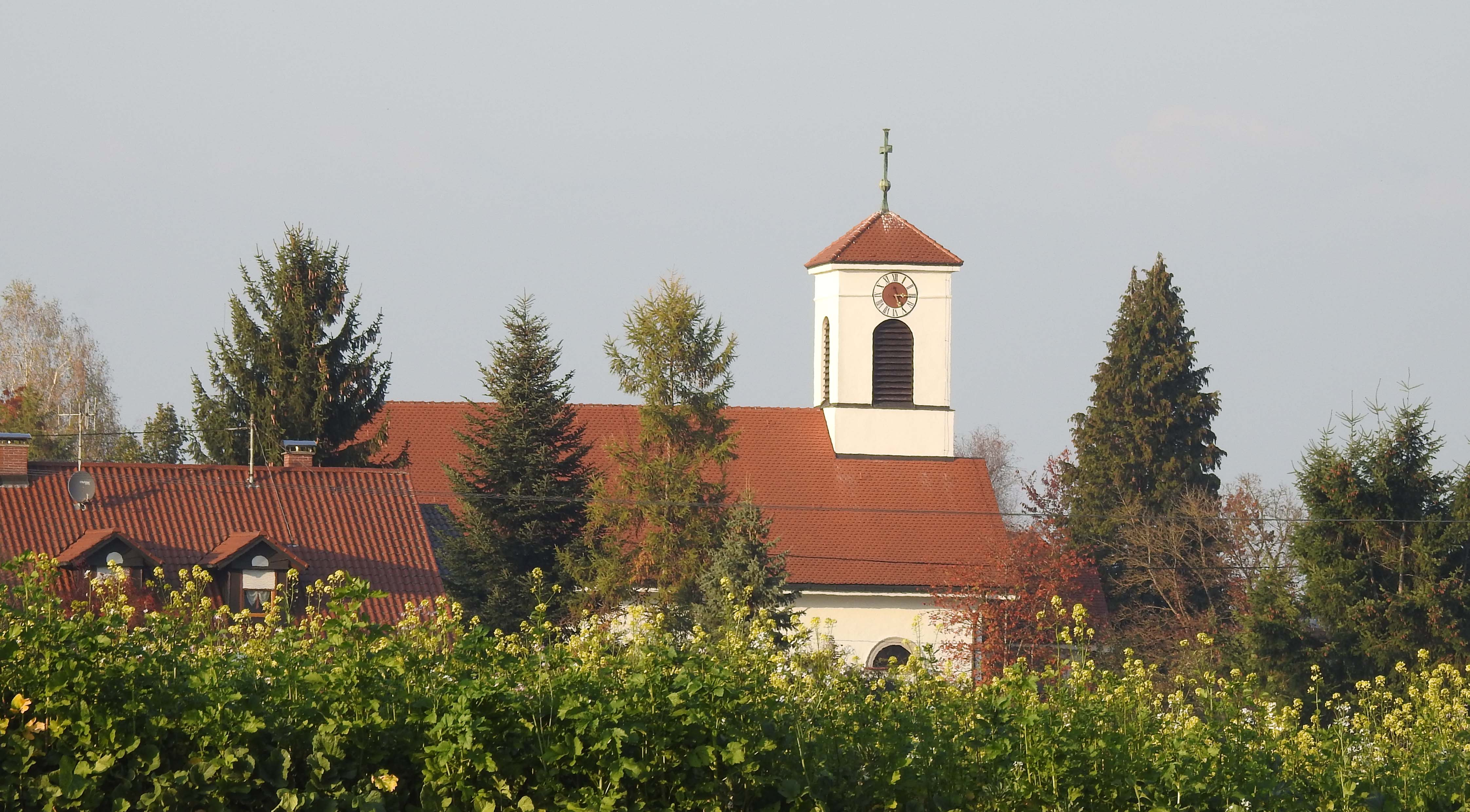 Kirche St. Georg in Bachern von Süden, Friedberg (Schwaben)